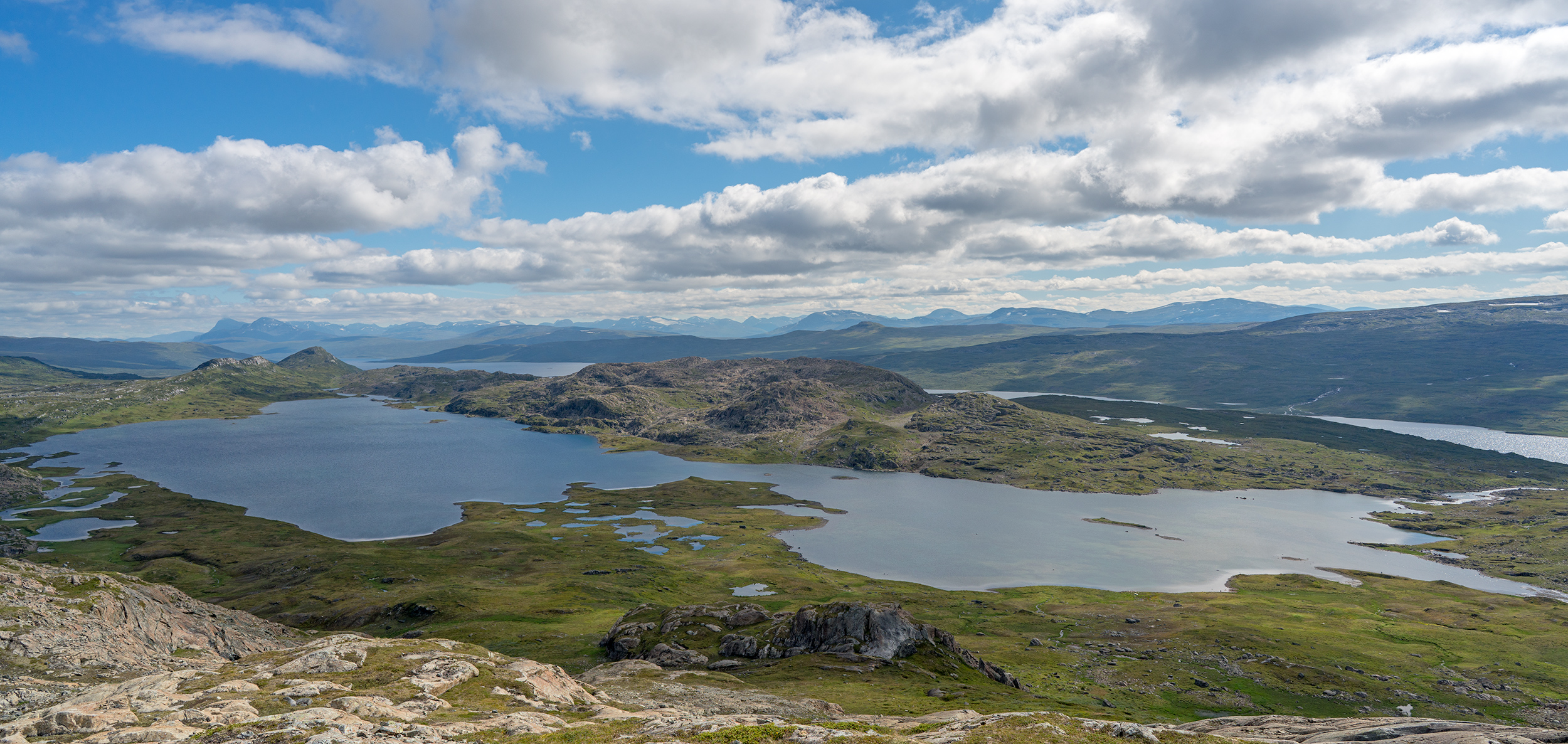 Miehtjerjávrre - vy från Mellomfjellet.